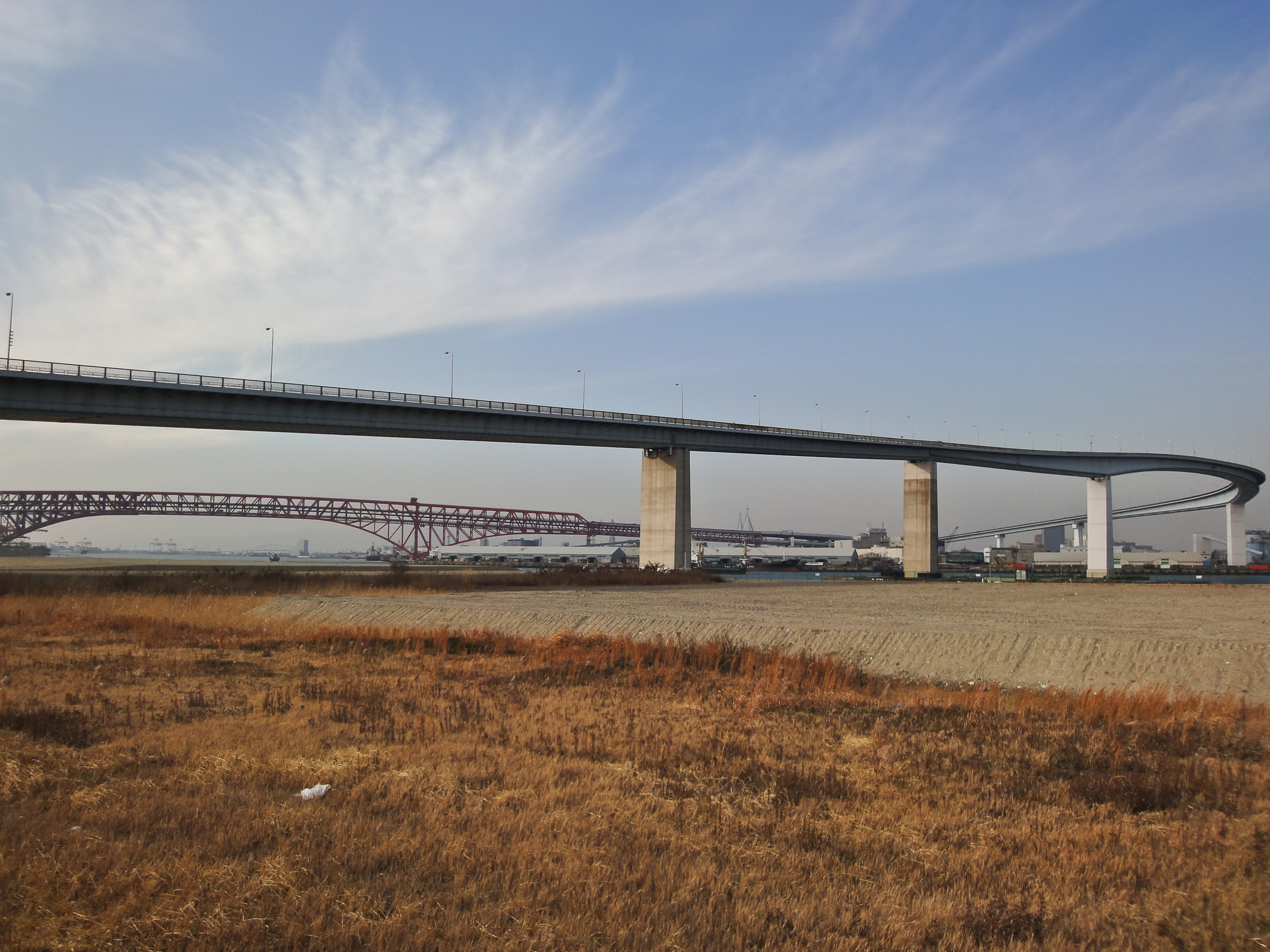 Namihaya Bridge